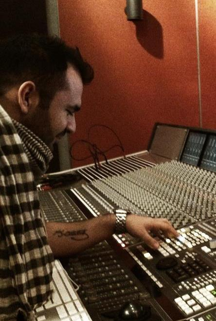 Sermet Agartan im SSL Studio